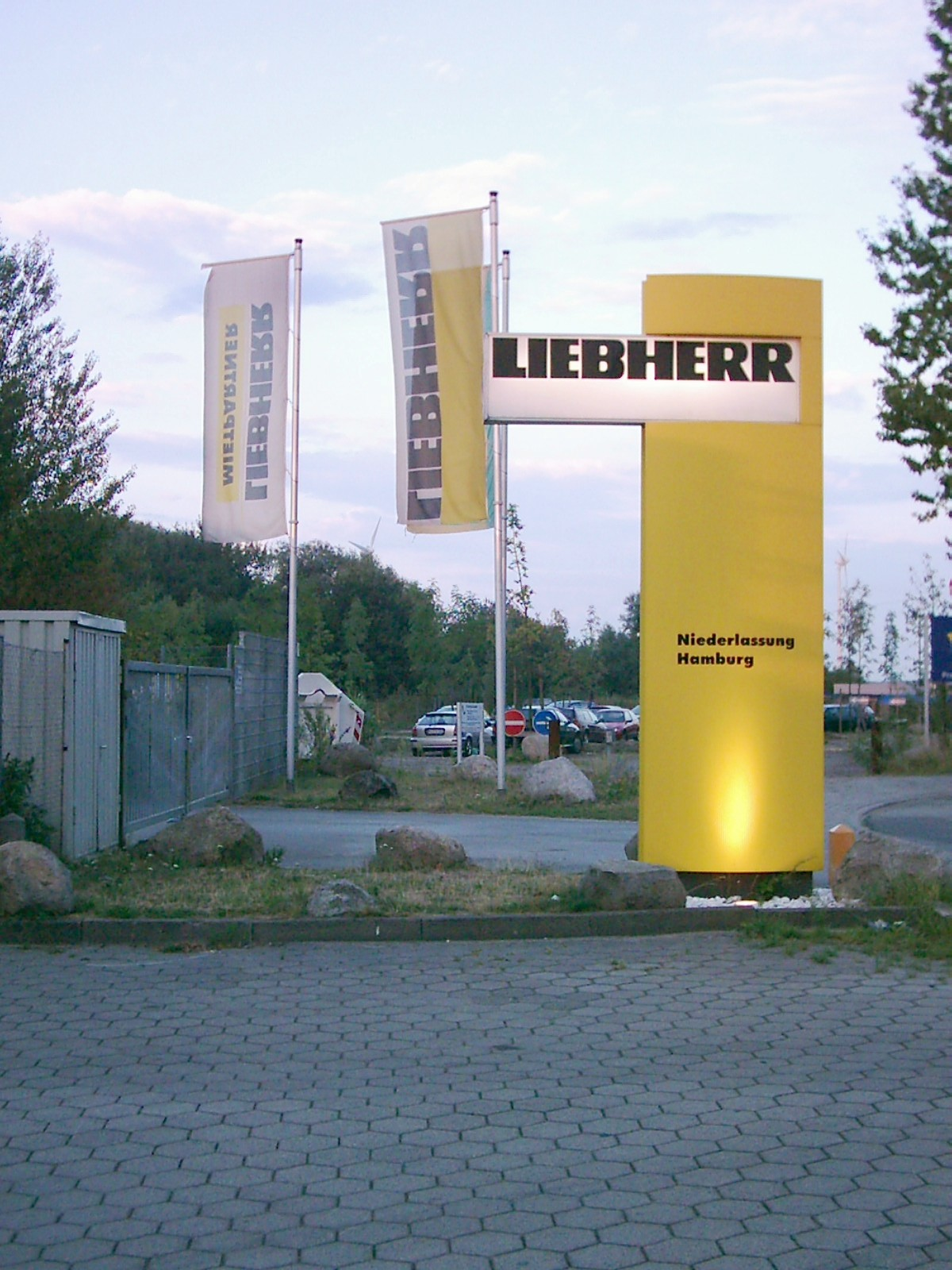 Liebherr Niederlassung in Hamburg-Harburg.